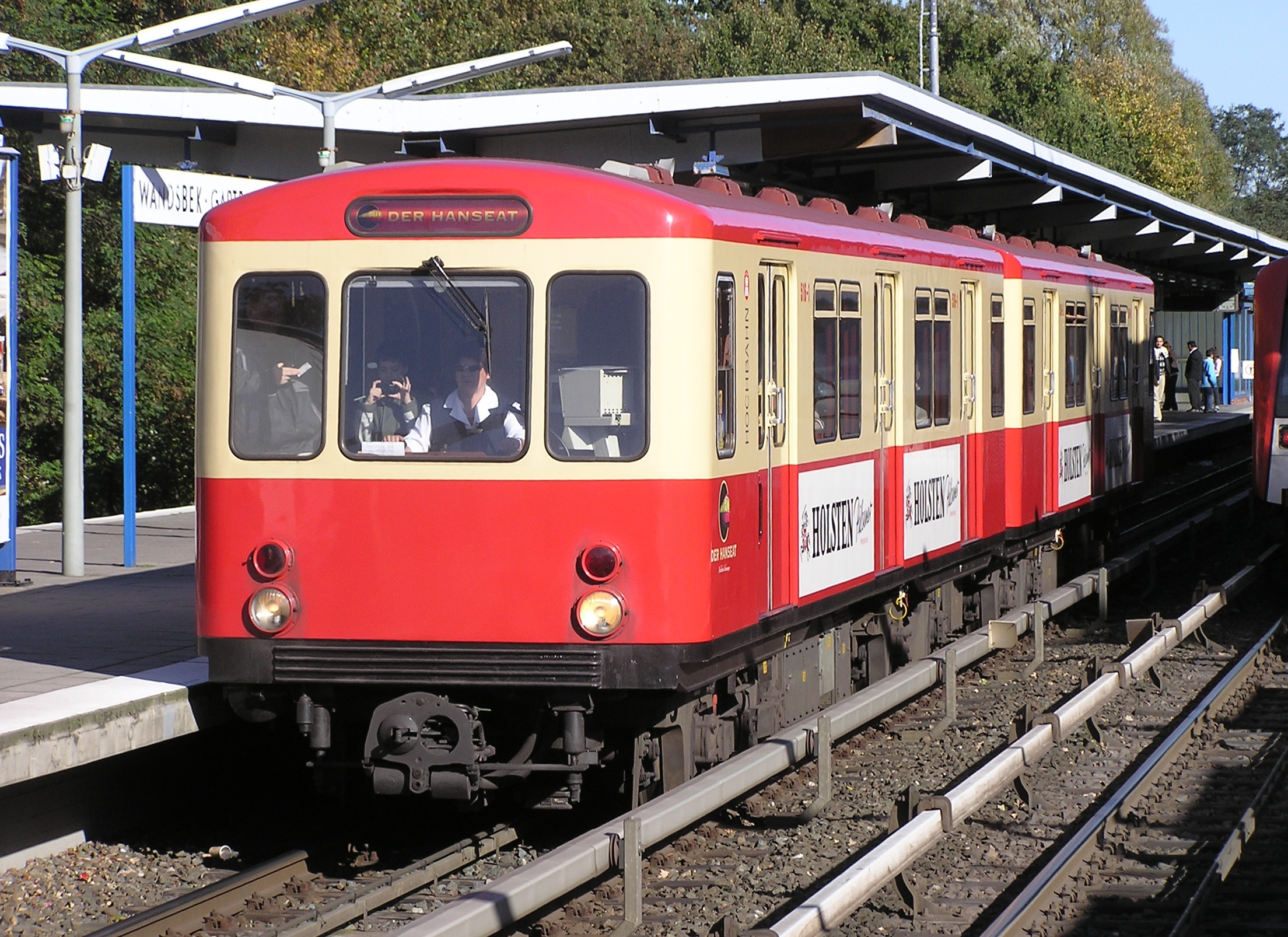 Fahrzeuge der Hamburger Hochbahn im Bahnhof Wandbek-Gartenstadt